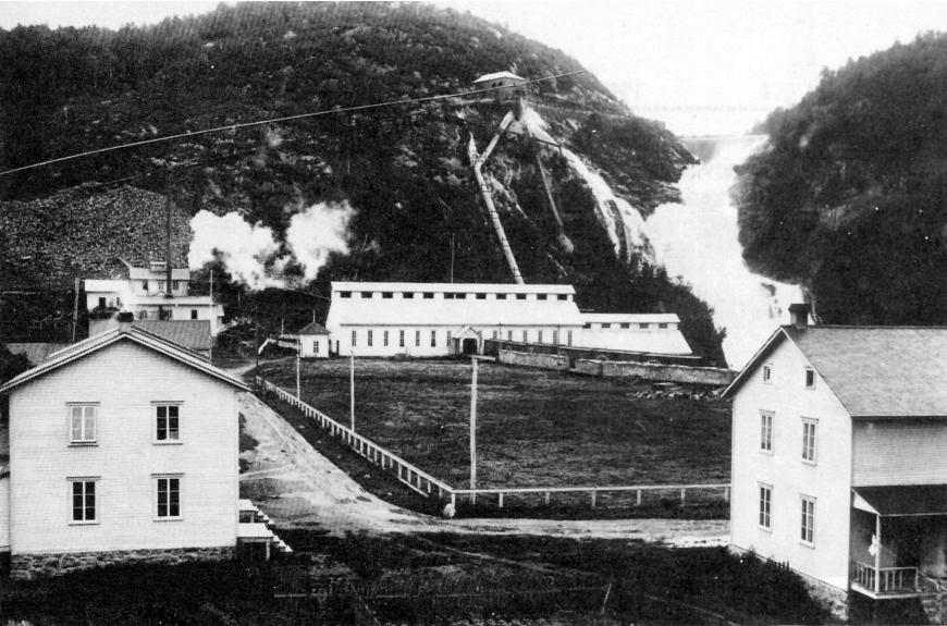 La pulperie de Val-Jalbert, en 1902